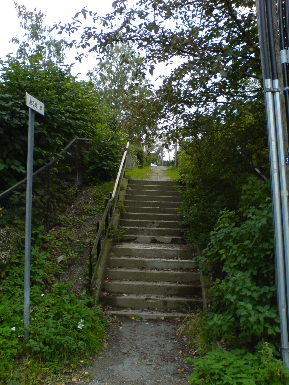 Aspestien at Ekeberg in Oslo